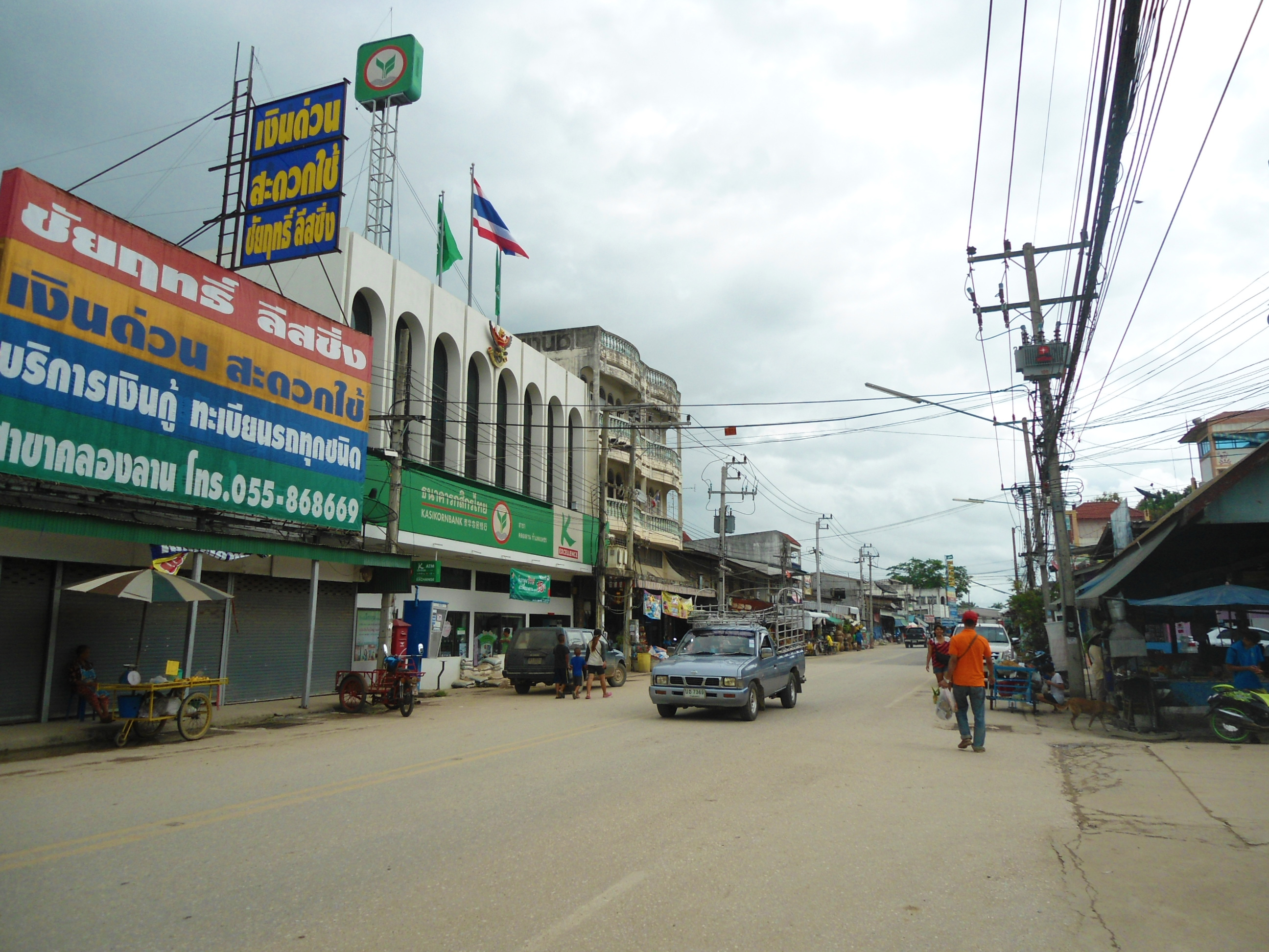 ตลาดคลองลานบนทางหลวงแผ่นดินหมายเลข 1072 ตำบลคลองลานพัฒนา อำเภอคลองลาน จังหวัดกำแพงเพชร